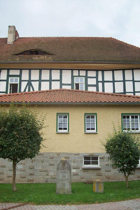 Altes Gutshaus und Kursächsischer Viertelmeilenstein Oppershausen